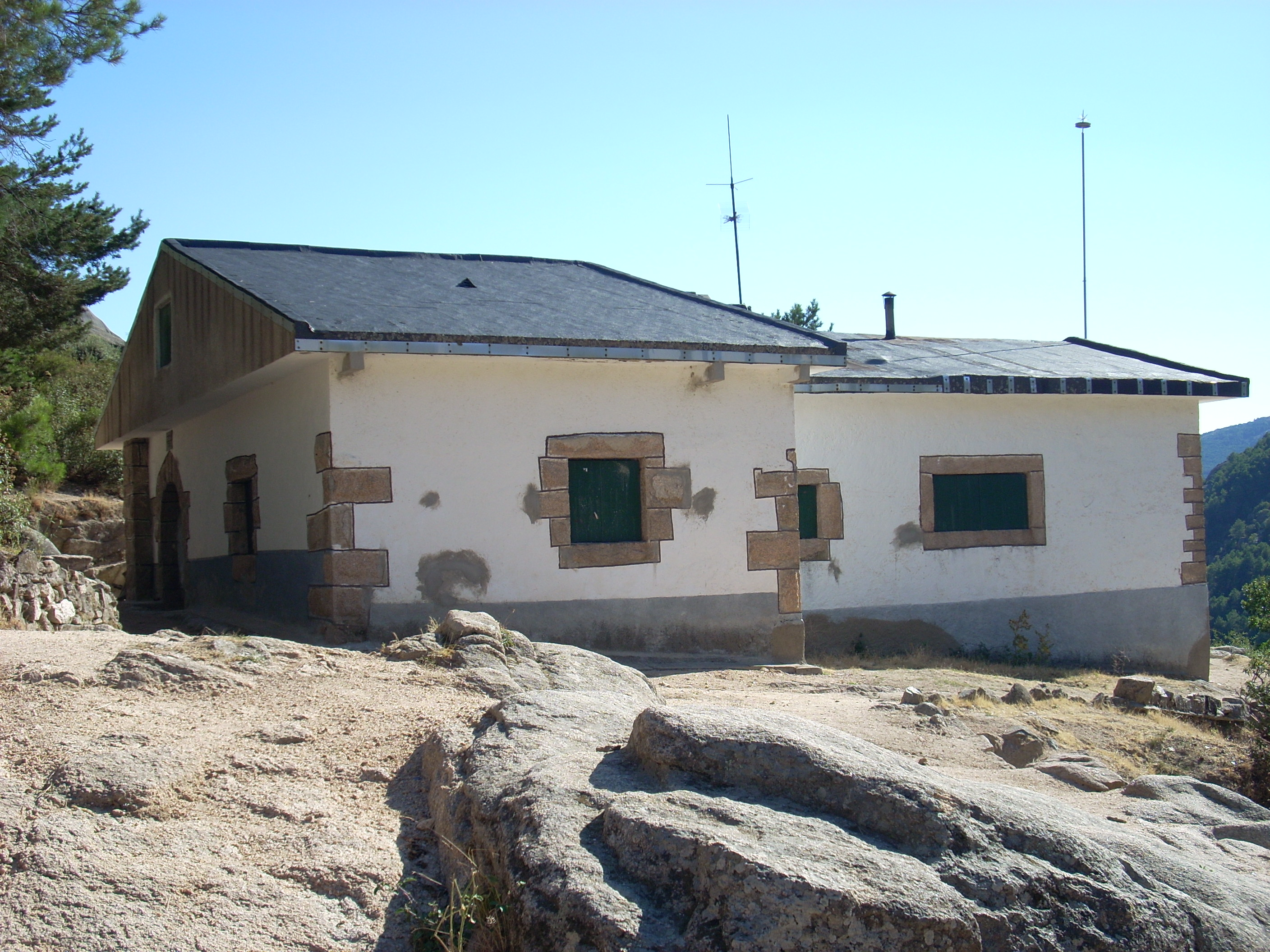 Refugio Giner de los Rios, la Pedriza, Manzanares el Real, Madrid, España